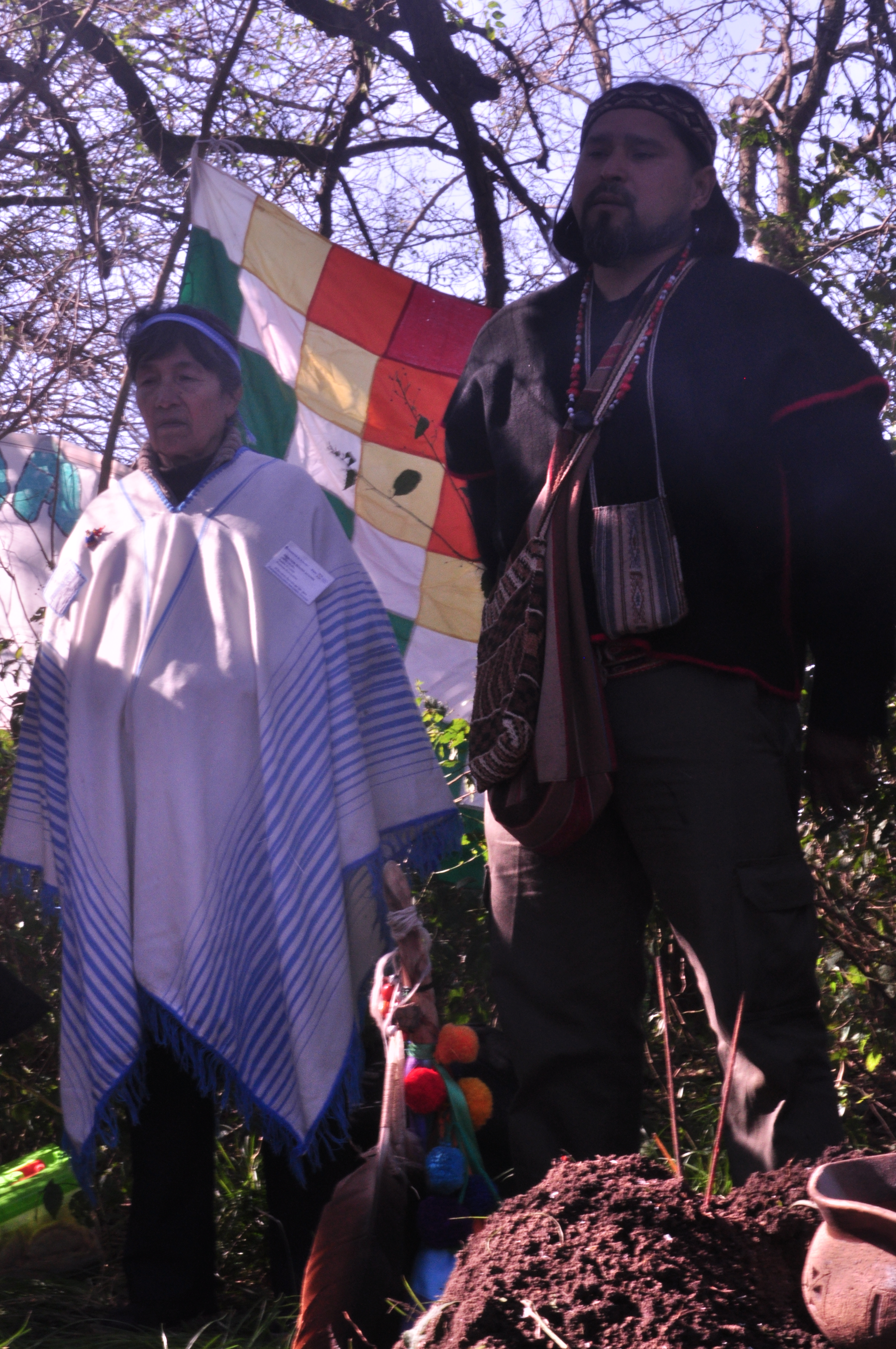 Celebración de la Corpachada 2018